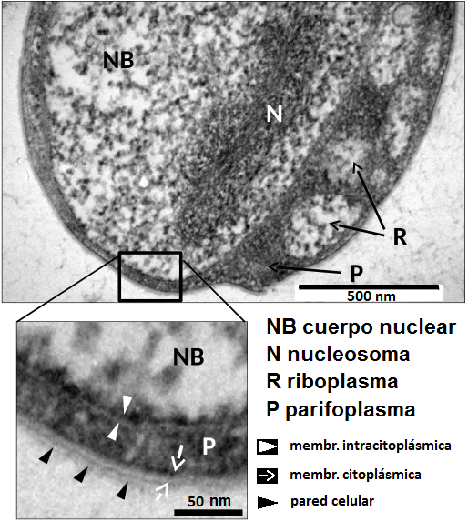 Pared celular, membrana plasmatica y membrana intracitoplasmatica. TEM